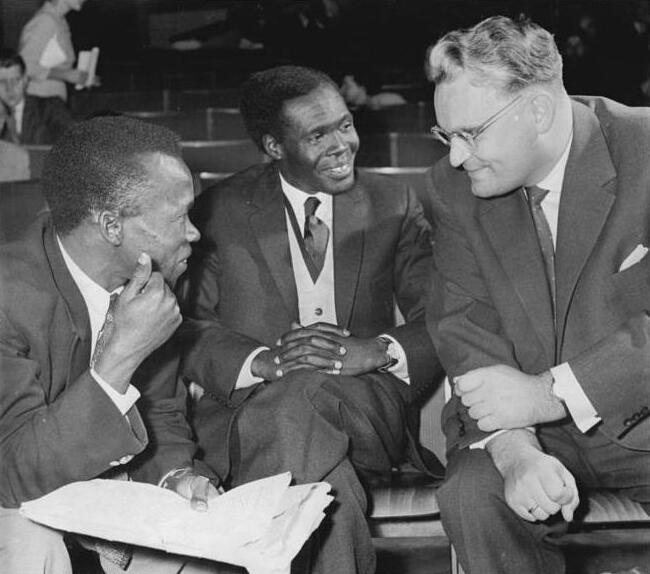 Leipzig, Kenia-Tag, Gerald Götting Zentralbild Schaar Koch 21.10.1960 Kenia-Tag in Leipzig - "Freiheit für Jomo Kenyatta und alle eingekerkerten Patrioten Kenias". Eine eindrucksvolle Veranstaltung zur 8. Wiederkehr des Tages der widerrechtlichen Verhaftung des Führers der afrikanischen Nationalunion Kenias, Jomo Kenyatta, fand am 20.10.1960 im großen Hörsaal der Fachschule für Post- und Fernmeldewesen statt. (Siehe ADN-Meldung 36 v. 20.10.1960) UBz: Der Stellvertreter des Vorsitzenden des Staatsrates. Gerald Götting (rechts) im Gespräch mit S. Oyaka (links) und Milton Obote, Präsident der Volkskongresspartei Ugandas.